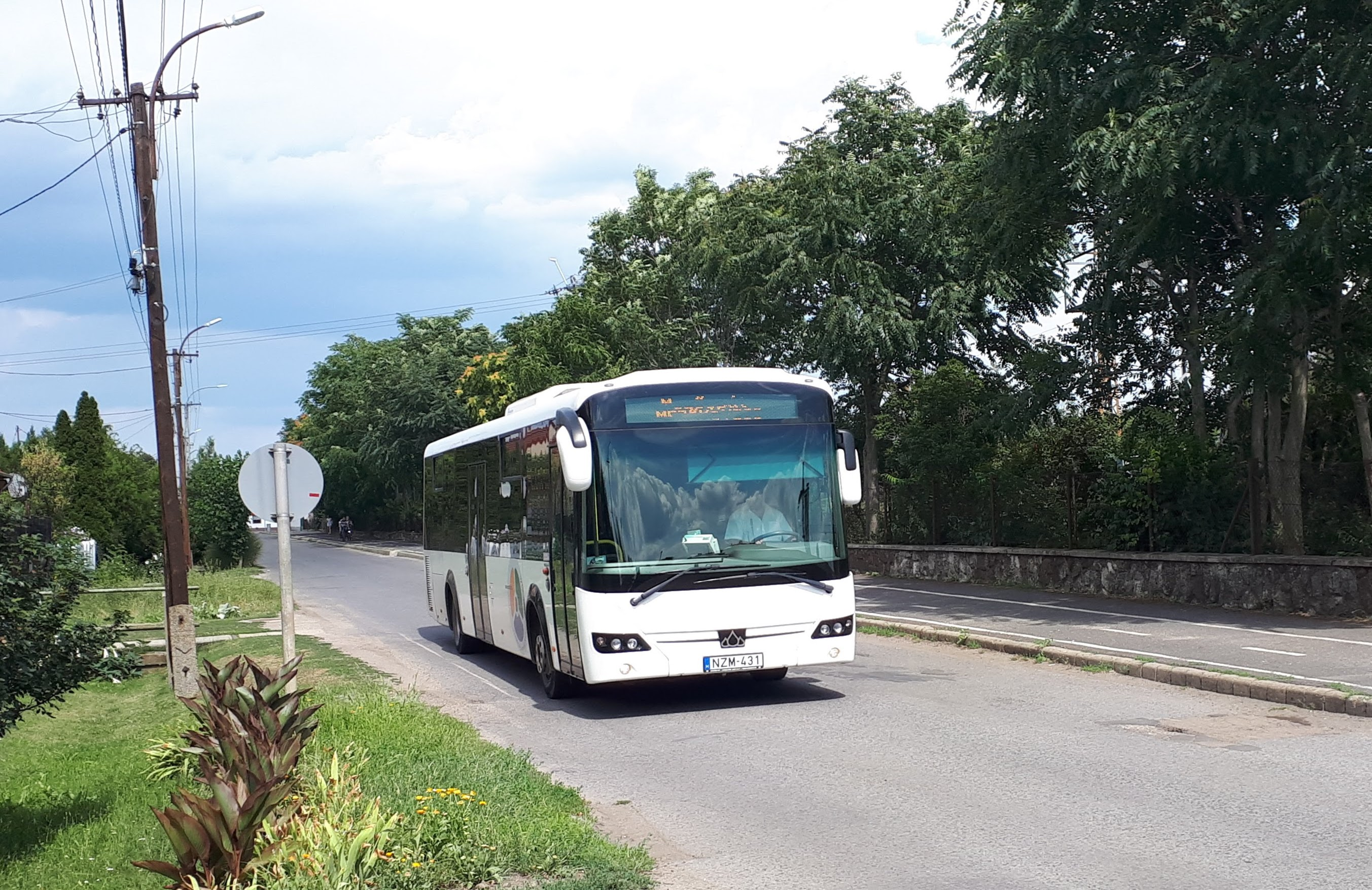 Az ÉMKK NZM-431 rendszámú Credo Econell 12 típusú busza Mezőkövesden, a 4010-es helyközi járaton.